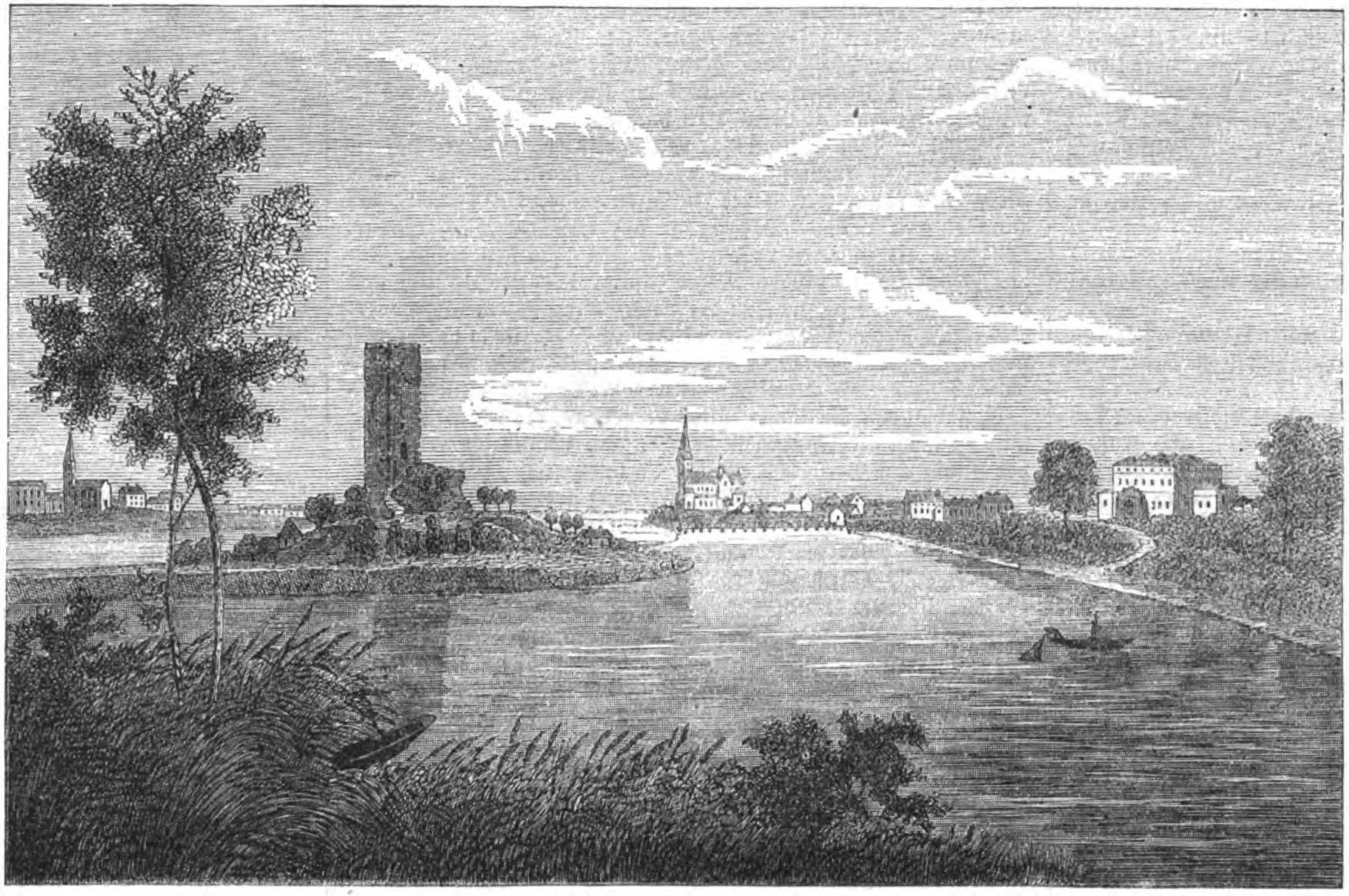 Der Mäuseturm bei Kruschwitz, 1866.